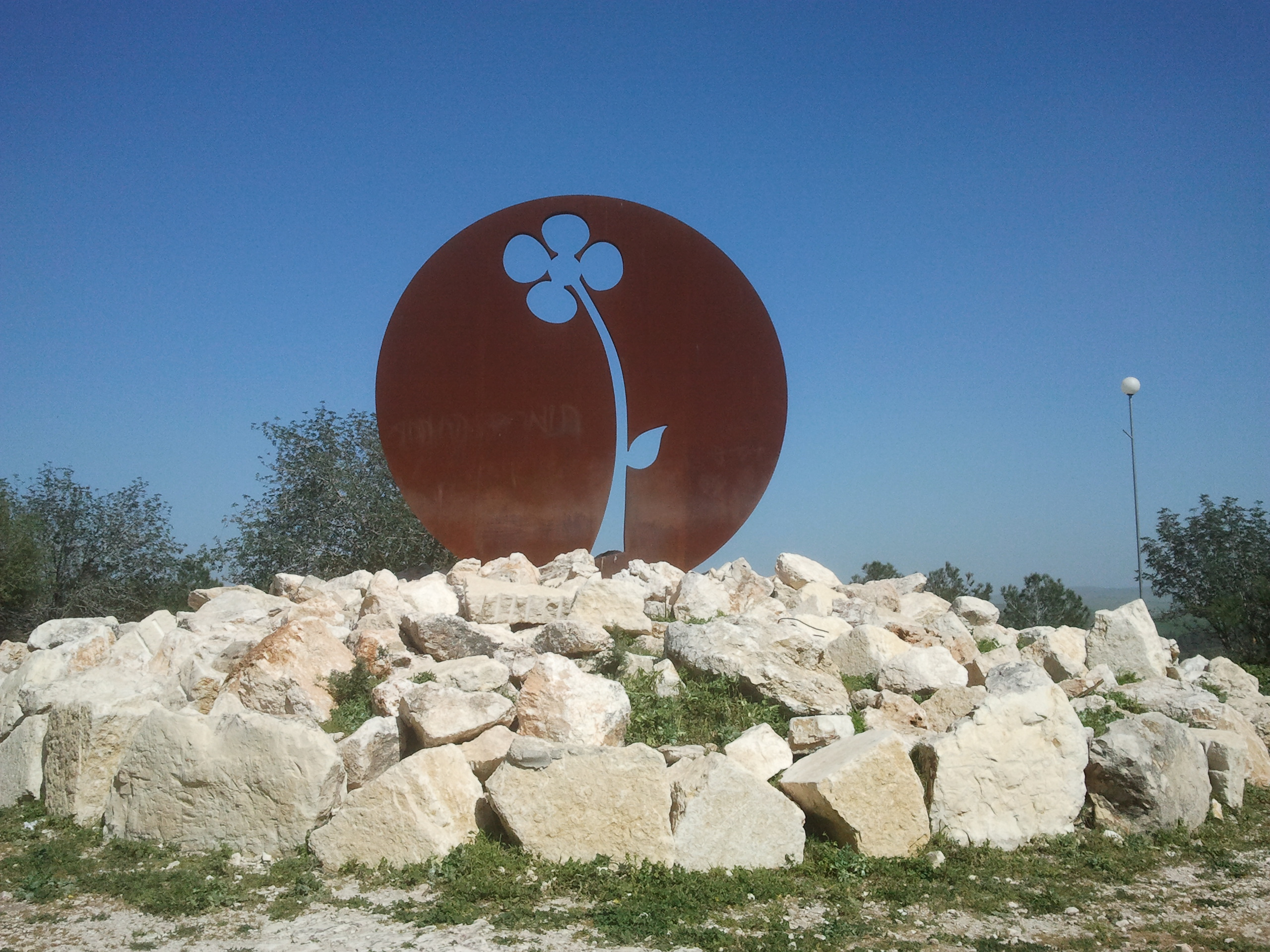 ההר העגול נמצא ליד המושב עמיקם, הוא אתר הנצחה בן המושב הצנחן ראובן גלקין שנפל בחווה הסינית בראש הגבעה אנדרטה לזכרו